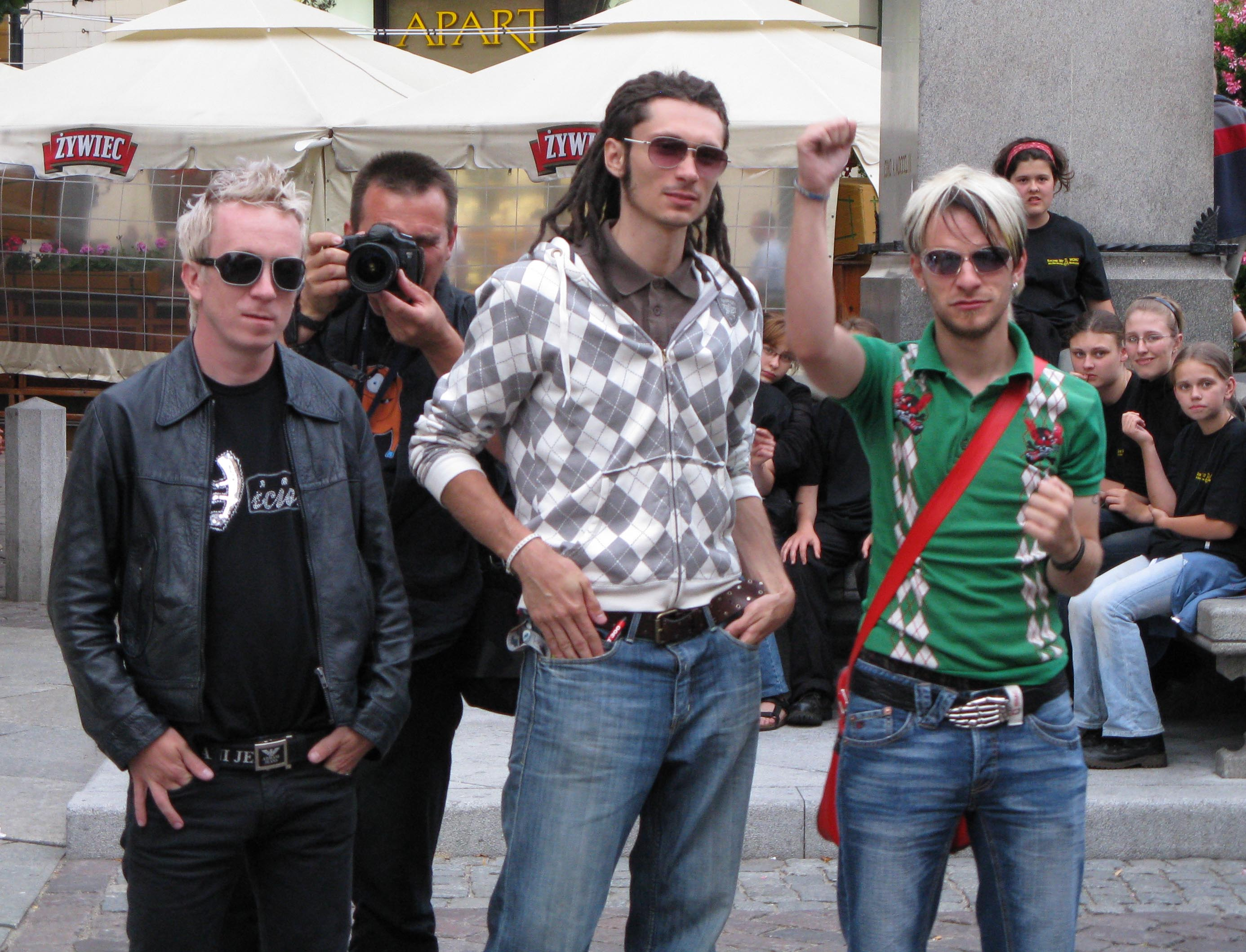 Video (grupa muzyczna) w Toruniu